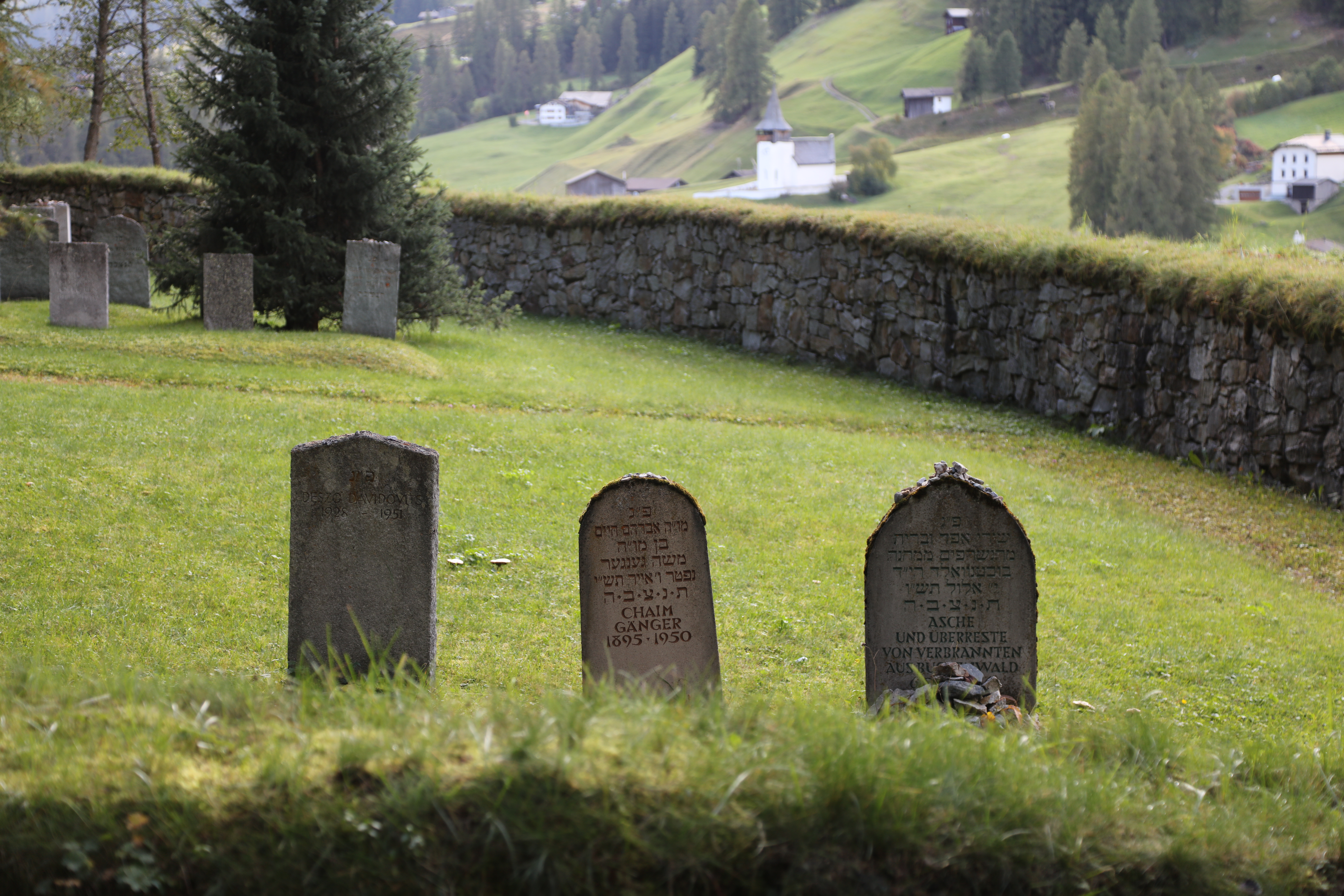 Der Waldfriedhof in Davos hat auch ein jüdisches Gräberfeld.